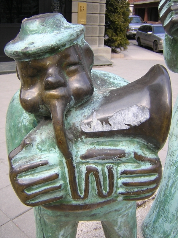 Skopje,Macedonia